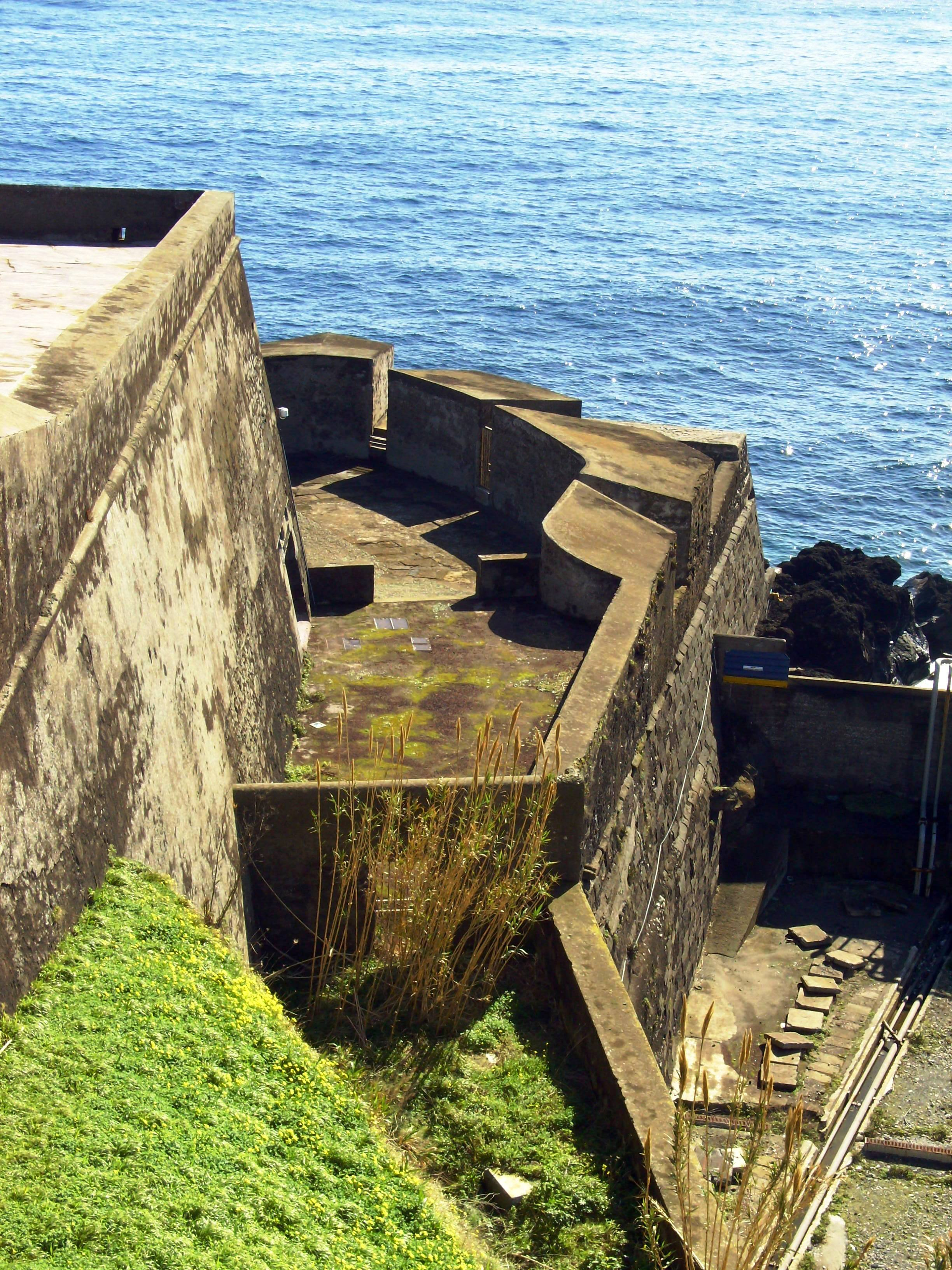 Forte de São Sebastião, freguesia de Nossa Senhora da Conceição, cidade e concelho de Angra do Heroísmo, ilha Terceira, Açores: vista da bateria baixa.